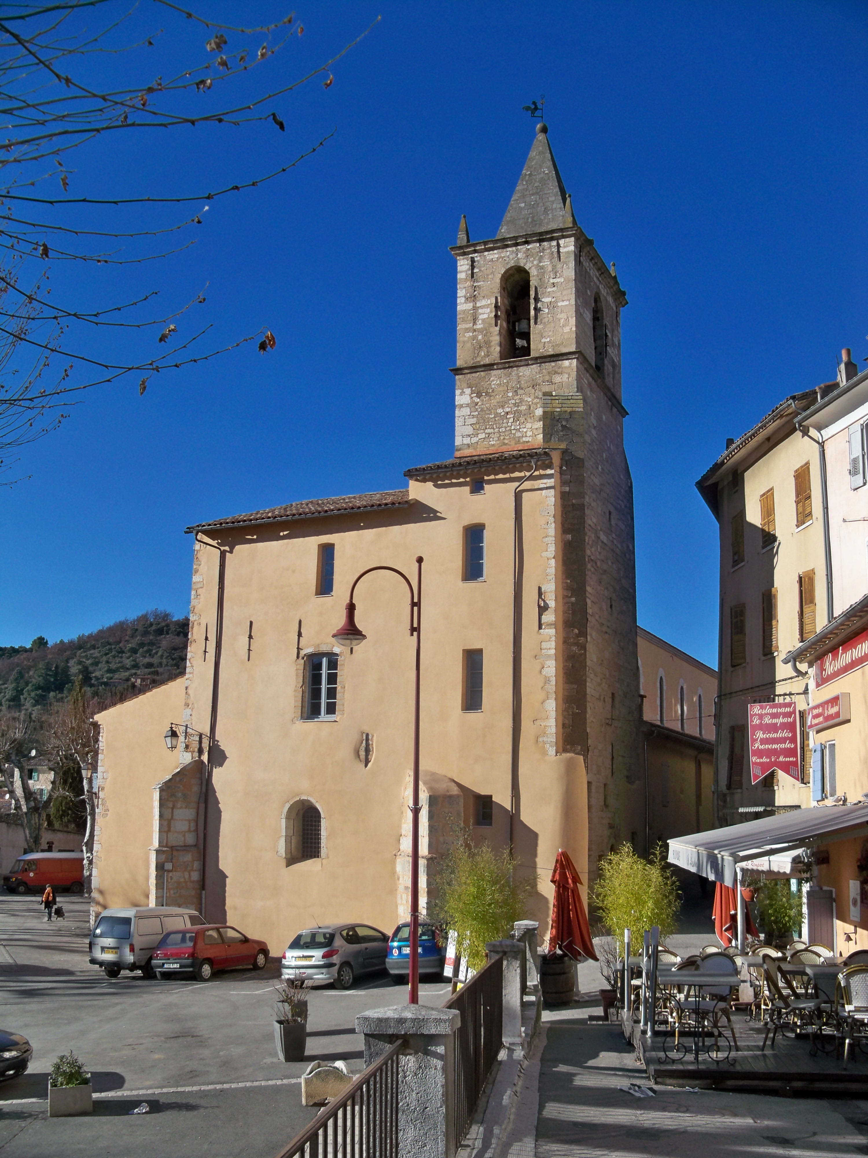 NotreDame de l'Assomption de Riez (04), France